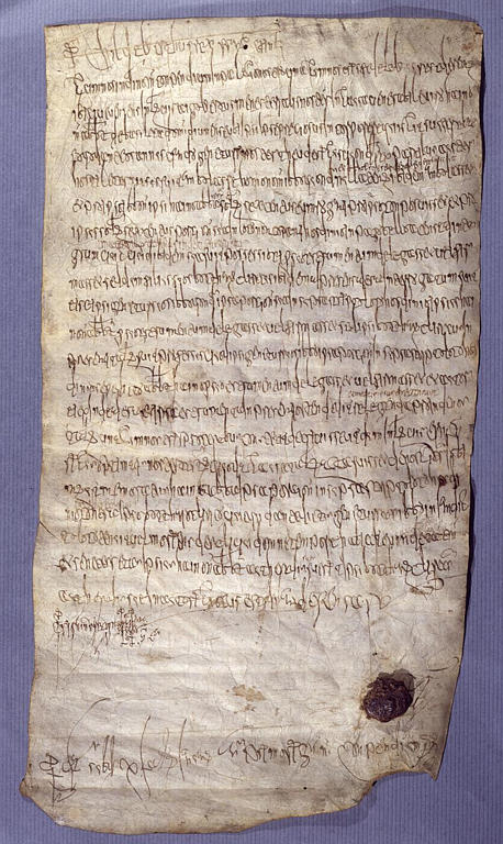 Le roi Childebert III rend un jugement qui accorde à l'abbaye de Saint-Denis la terre de Hodenc-l'Evêque dans l'Oise, 23 décembre 695. Parchemin d'environ 26 x 48 cm.